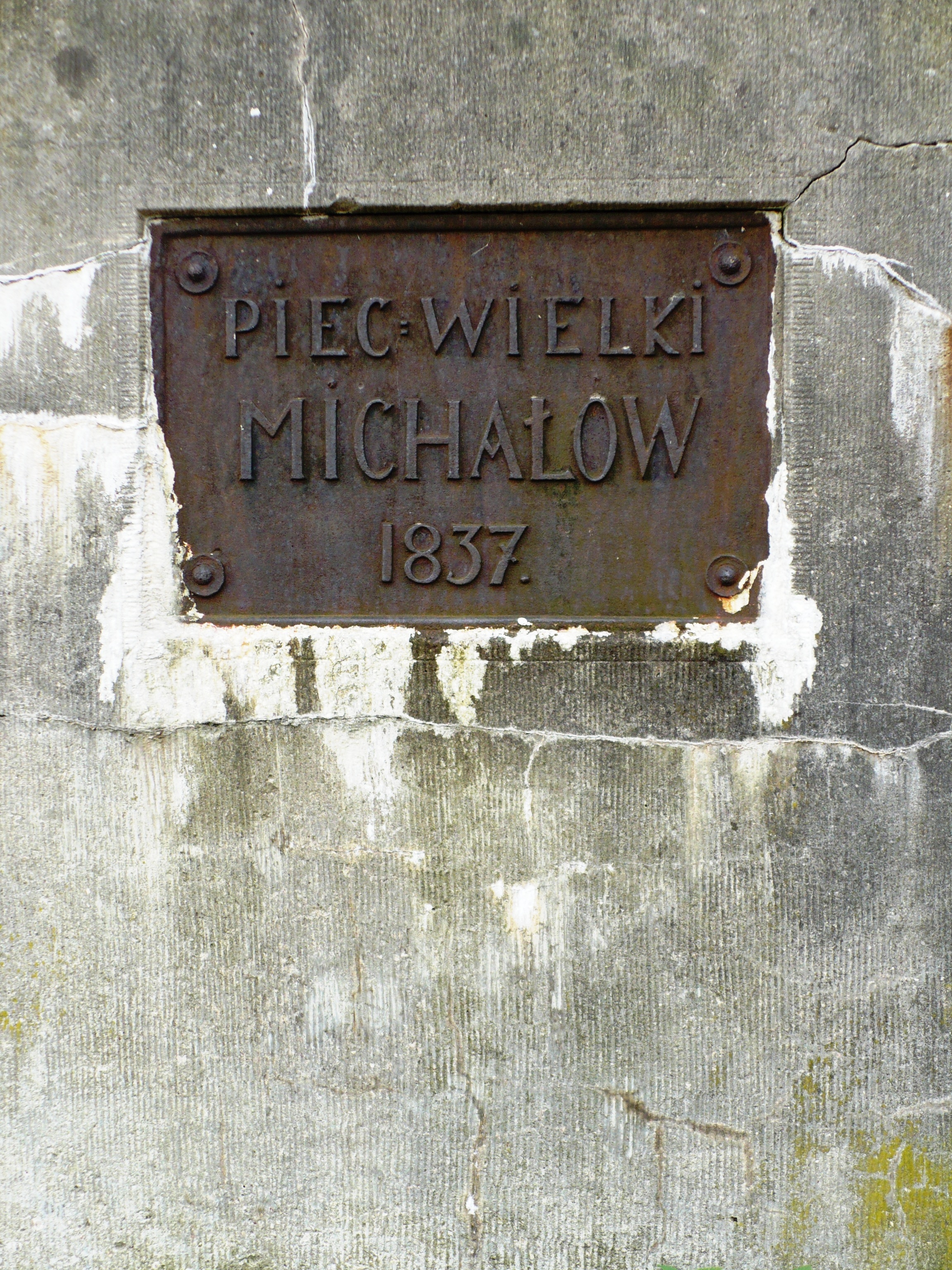 Pomnik upamiętniający wzniesienie pierwszej Huty Żelaza w Myszkowie